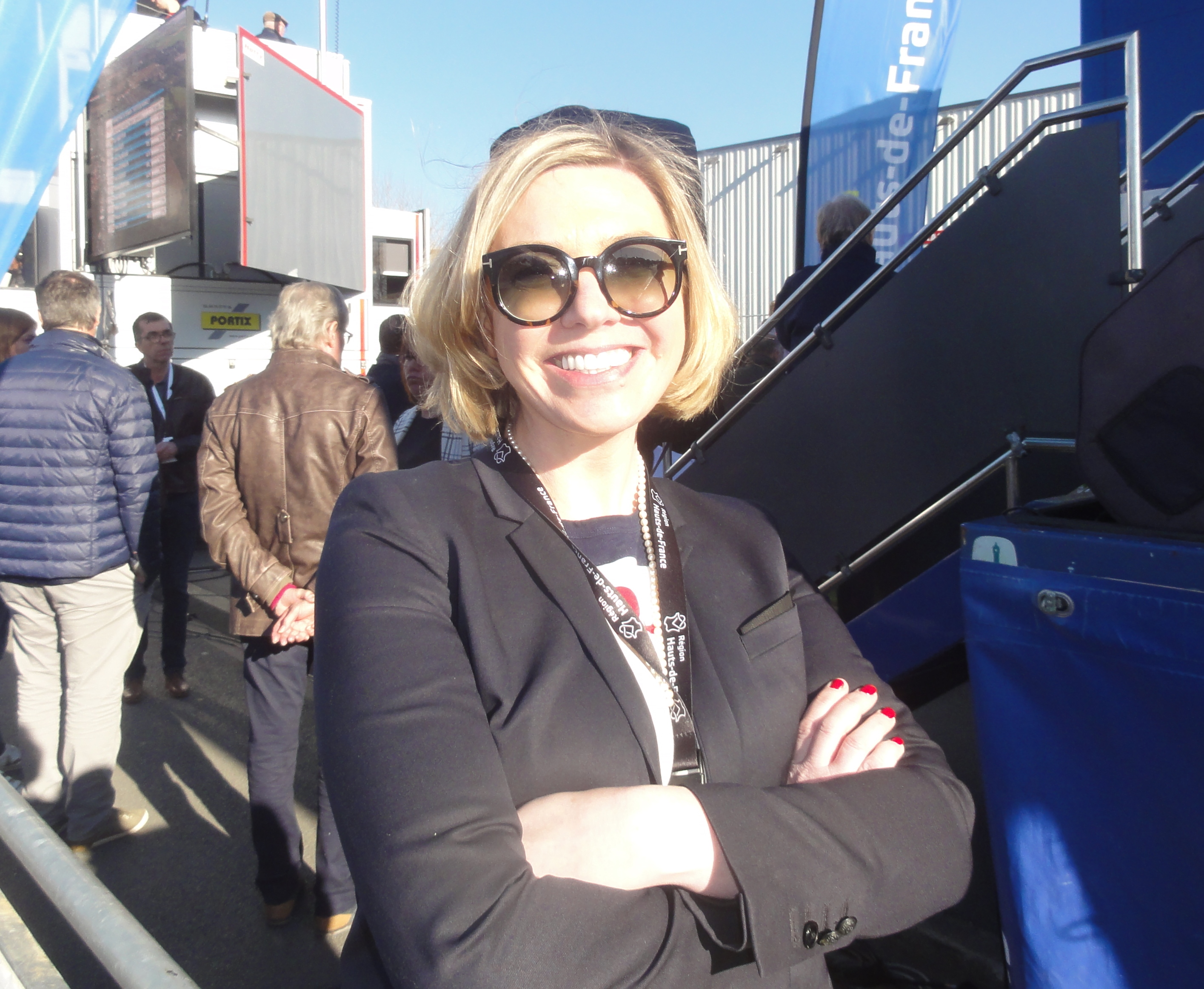 Reportage réalisé le dimanche 24 mars à l'occasion du départ et de l'arrivée du Grand Prix de Denain 2019 à Denain, Nord, Nord-Pas-de-Calais-Picardie, France.